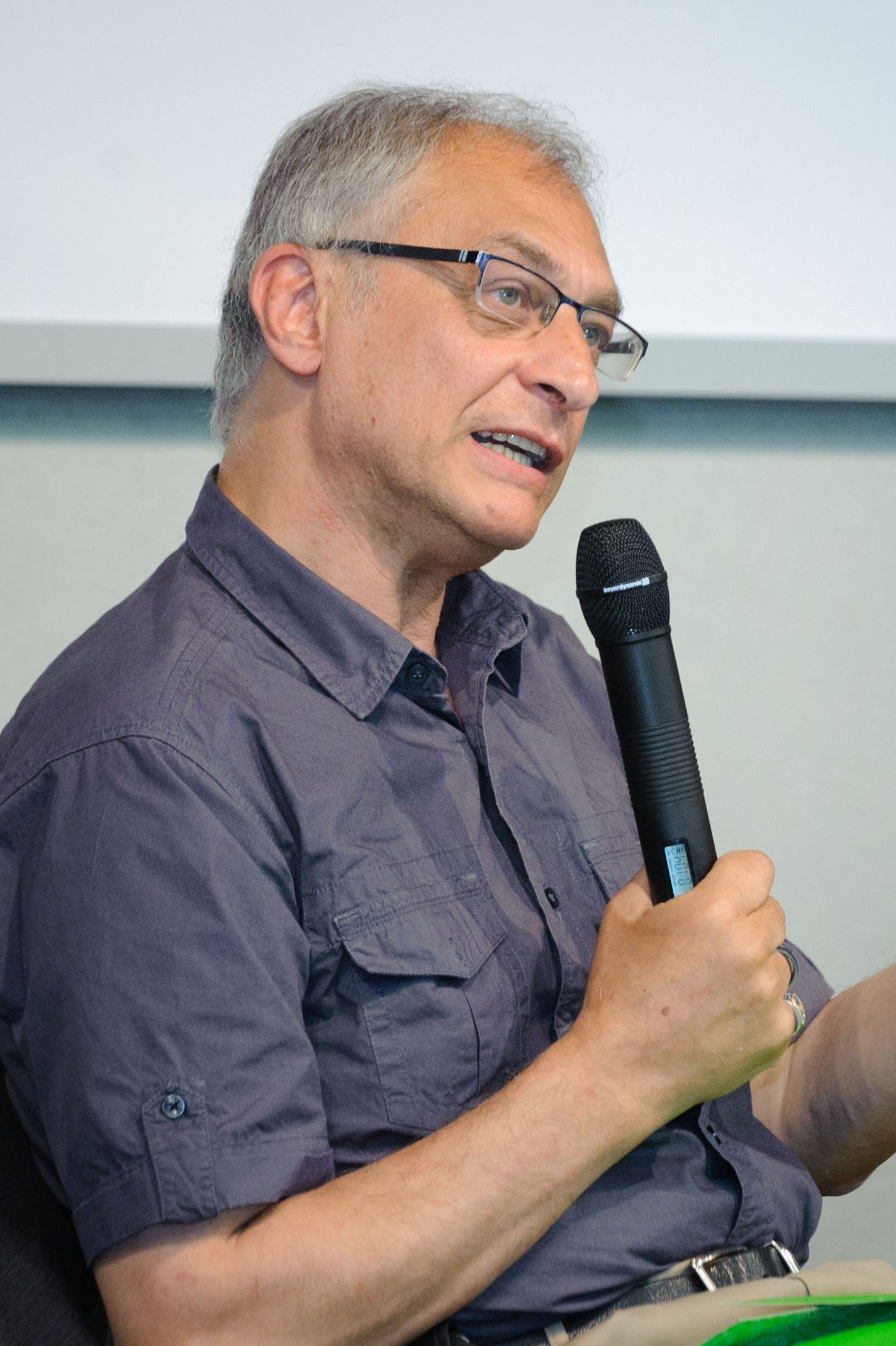 Safter Cinar (Beauftragter für Migrations- und Integrationsfragen des DGB Berlin-Brandenburg), Foto: Stephan Röhl